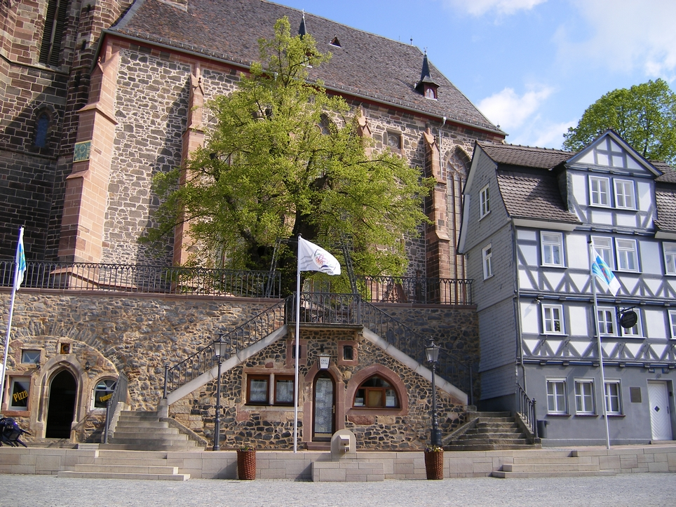 Blick auf die einmalige Treppenanlage in Homberg